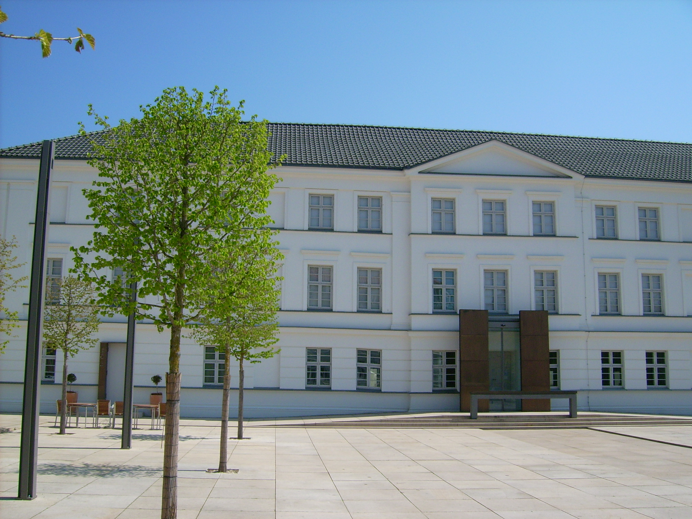 Bild des Pommerschen Landesmuseums in Greifswald